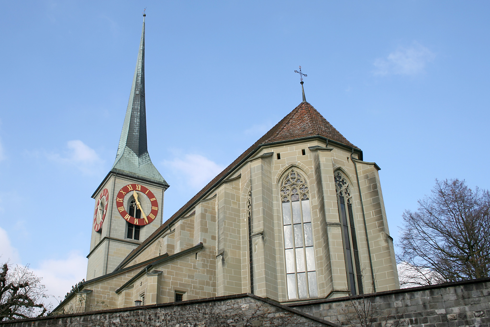 Stadtkirche Burgdorf, Schweiz